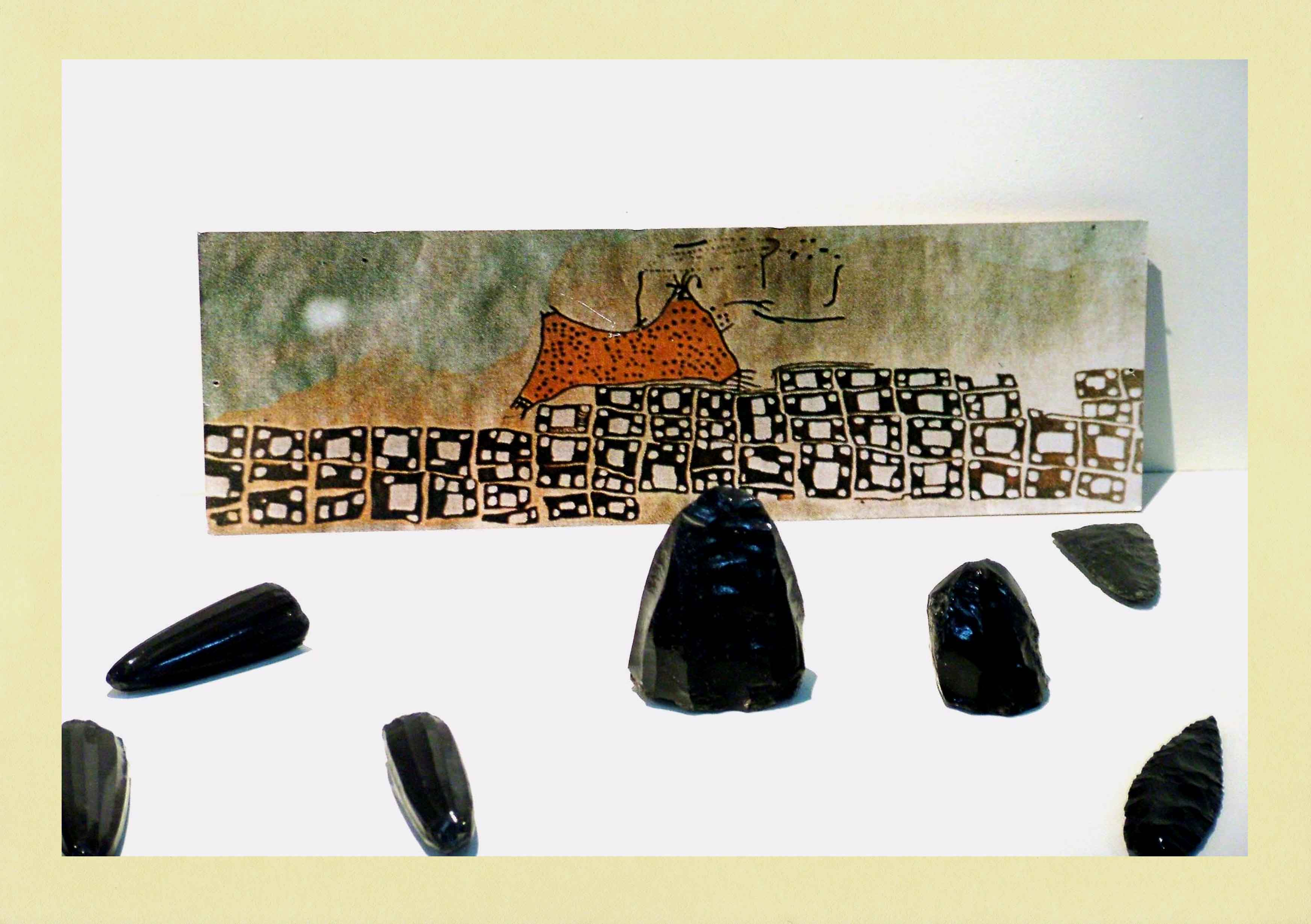 Catal Hüyük: Obszidián magkövek, falkép városalaprajzzal, háttérben a Kara Dag vulkán (Kiállítási tabló az ankarai Anatóliai Civilizációk Múzeumában)